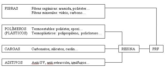 Esquema componentes plasticos reforzados con fibras